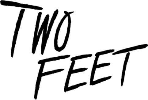 Two Feet, logo